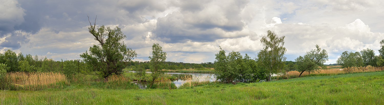 «Дулицьке», Сквирський район, в адміністративних межах Шамраївської та Дулицької сільської рад